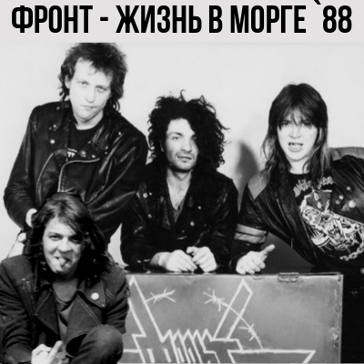 группа Фронт - Сергей Станков, Борис Вильчик, Владимир Костылев, Андрей Мельников